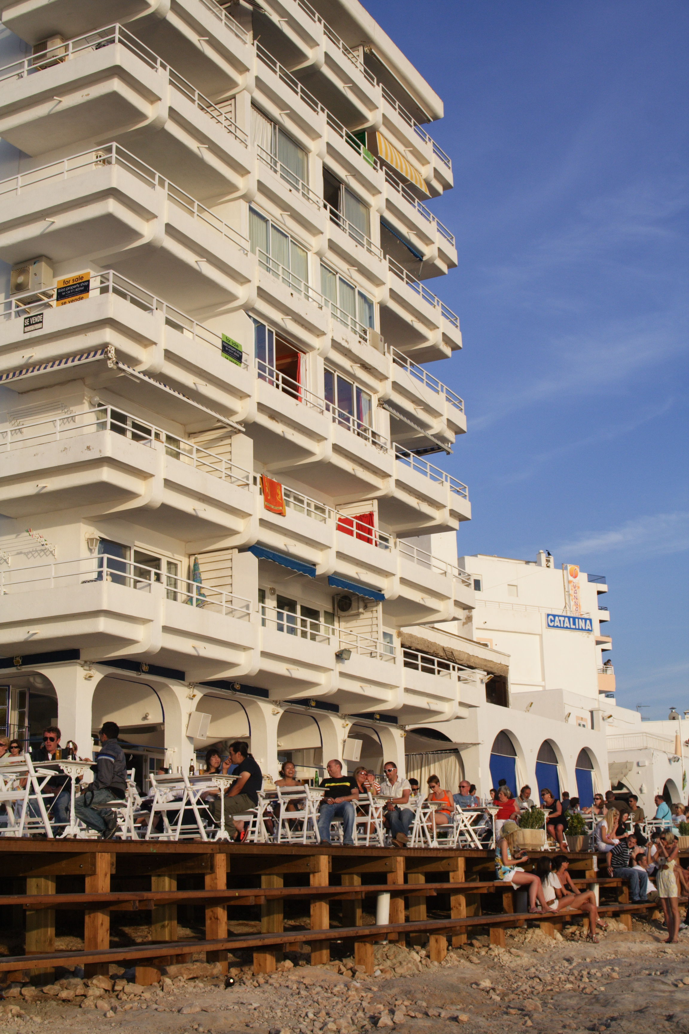 Cafe del Mar@San Antonio, Ibiza, Spain